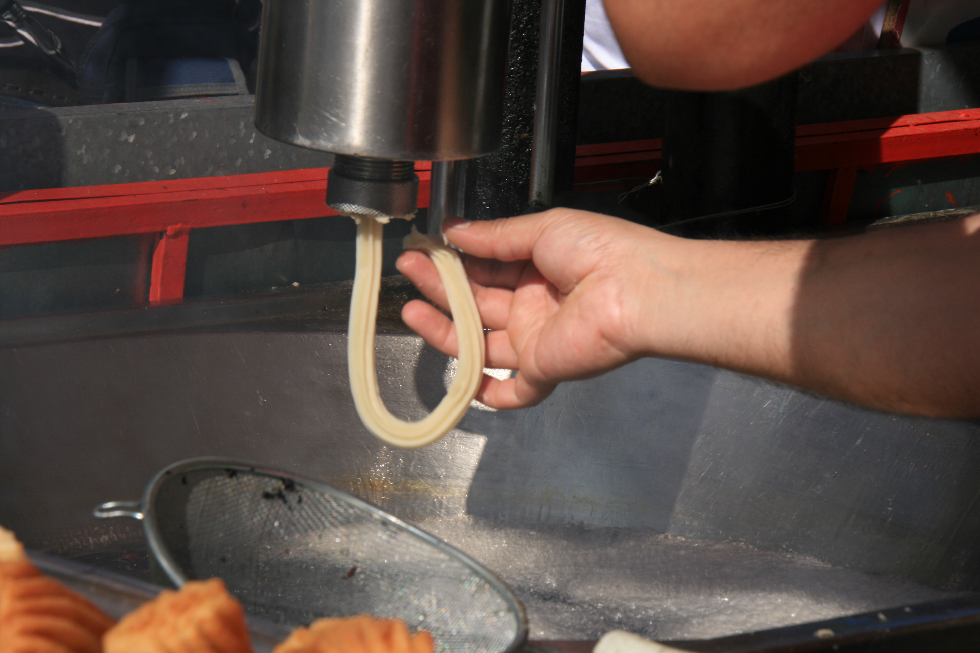 Churros